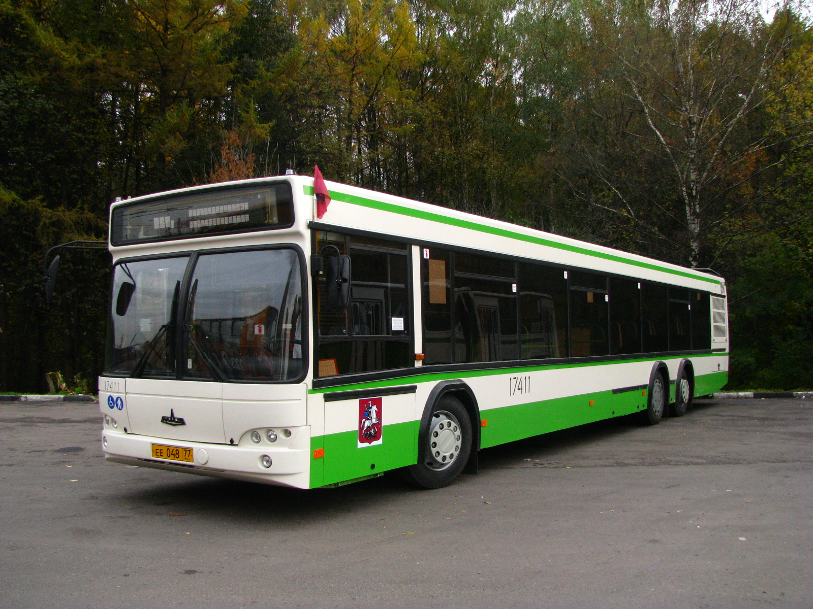 МАЗ-107.466 № 17411, к/ст "Ул. Академика Янгеля"